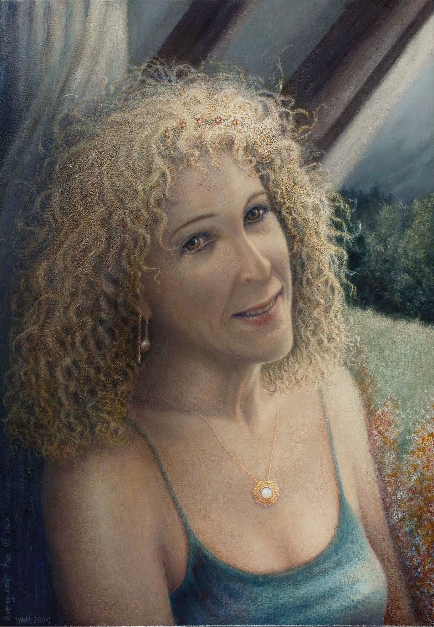 Every smile has its own sadness אקריליק ושמן על עץ לבוד. 100 על 70 סמ